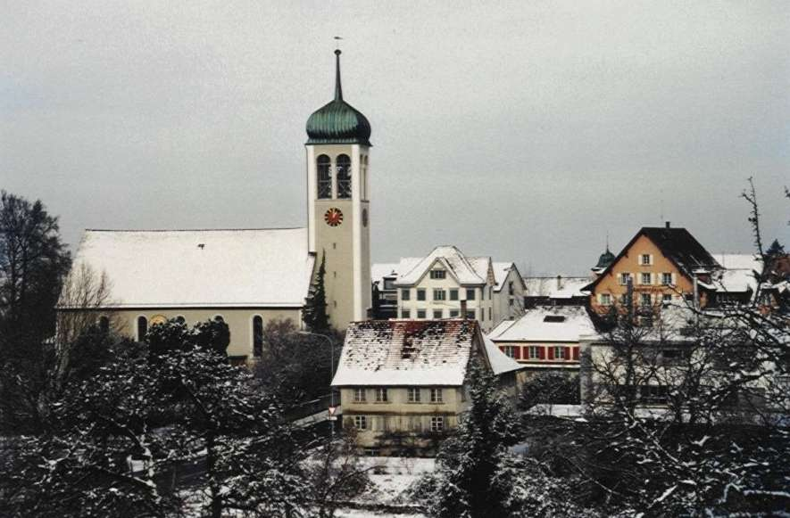 Center of Neukirch-Egnach, Thurgau, Switzerland